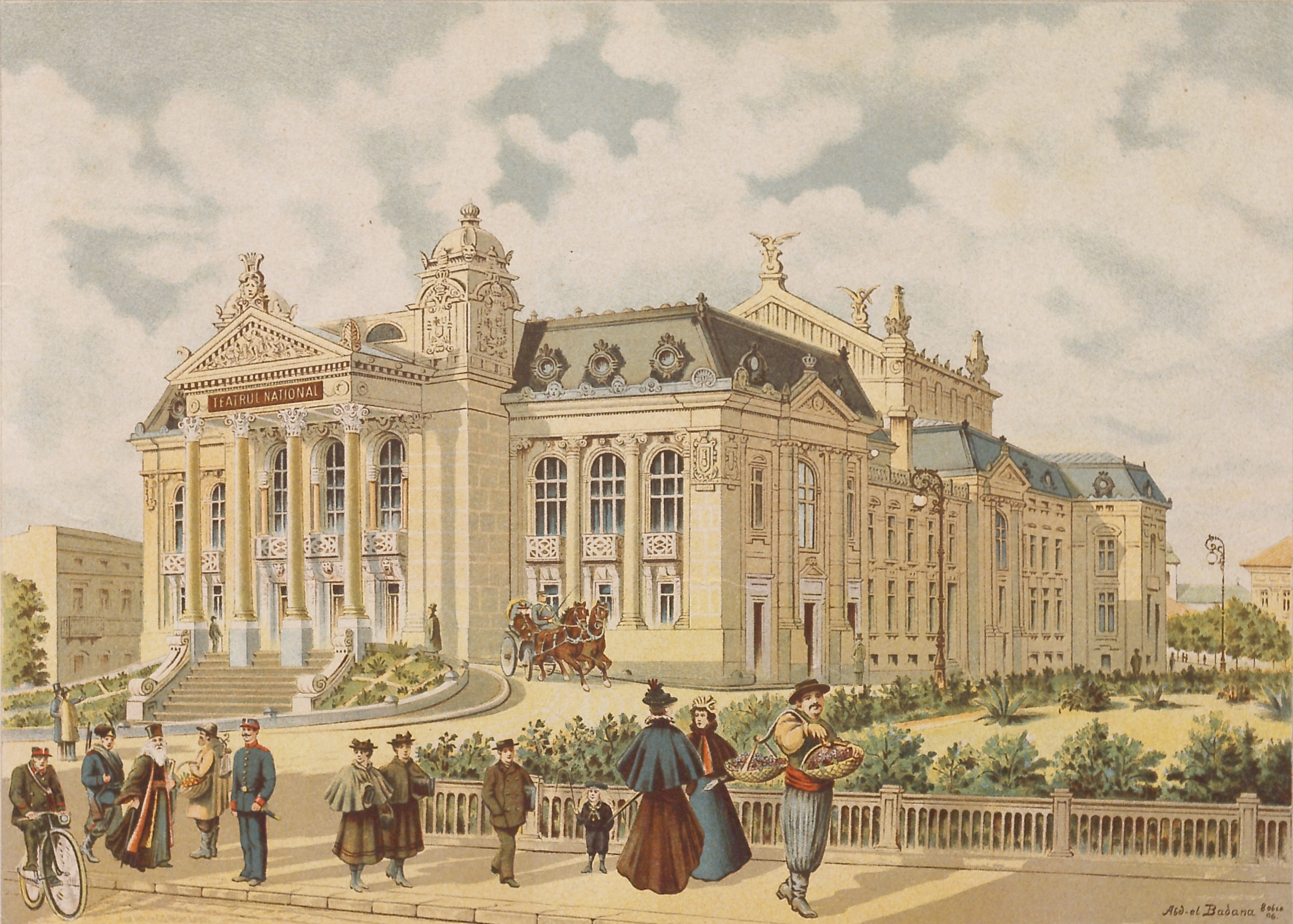 Teatrul Naţional din Iaşi inaugurat la 1 Decembrie 1896. Editura Librăriei Nouă P. Iliescu & D. Grosu